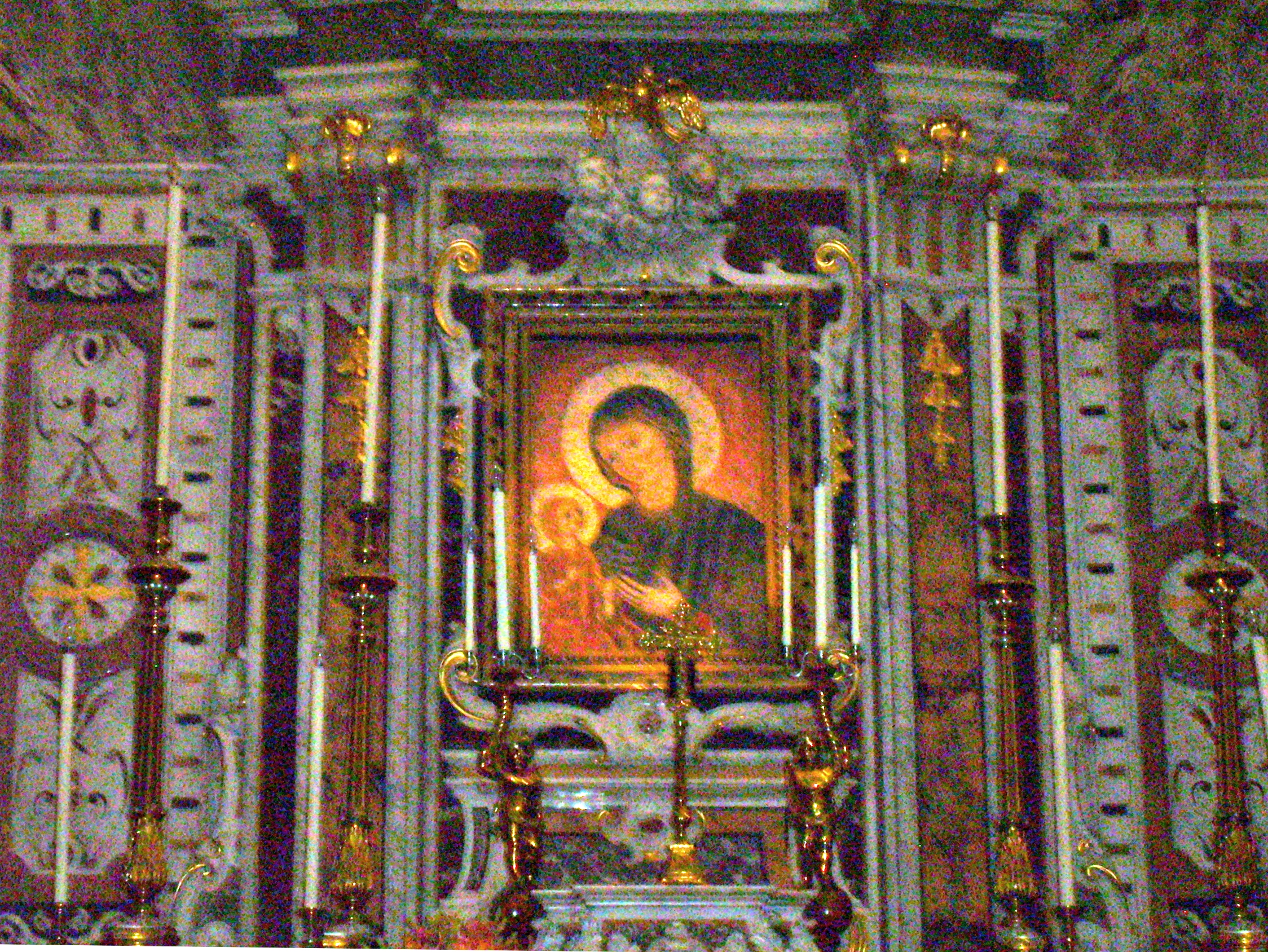 Icona bizantina della Madonna nella chiesa matrice di Francavilla Fontana